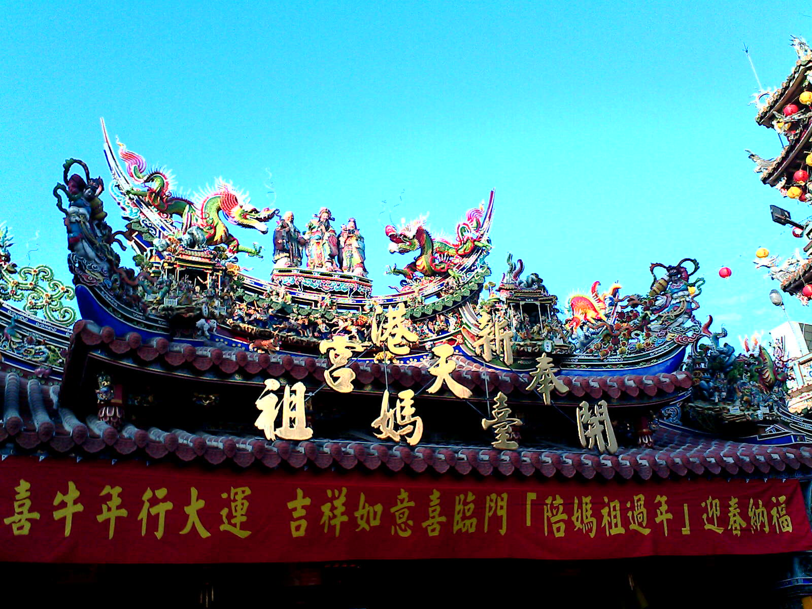 新港奉天宮。